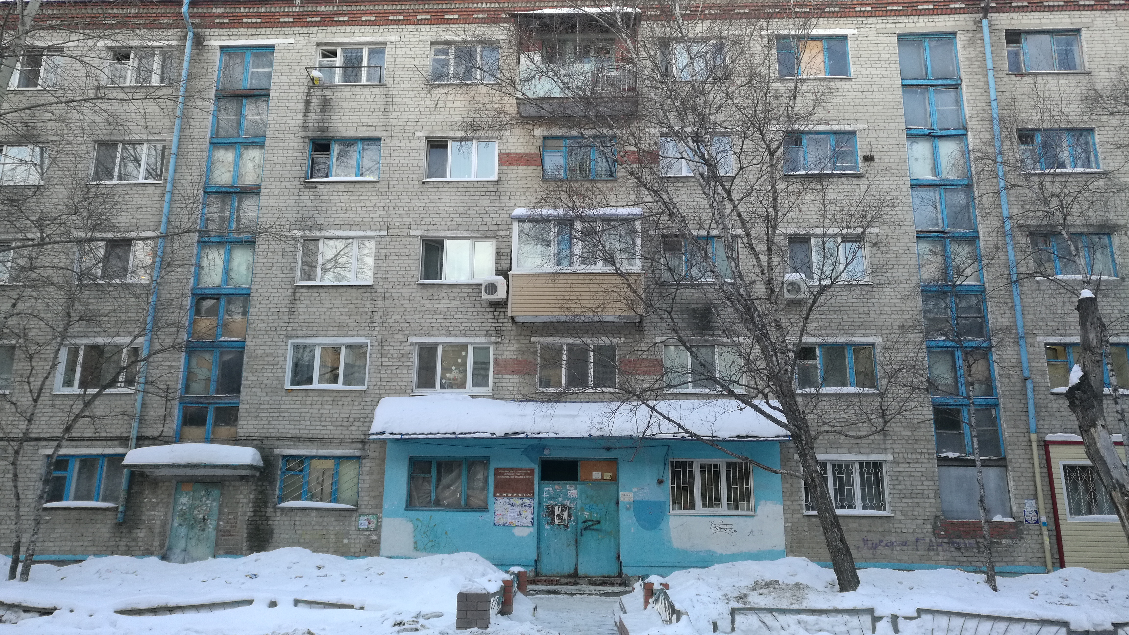 Komunloĝejo en strato Fabriĉnaja, 22. Tjumeno, Rusio.